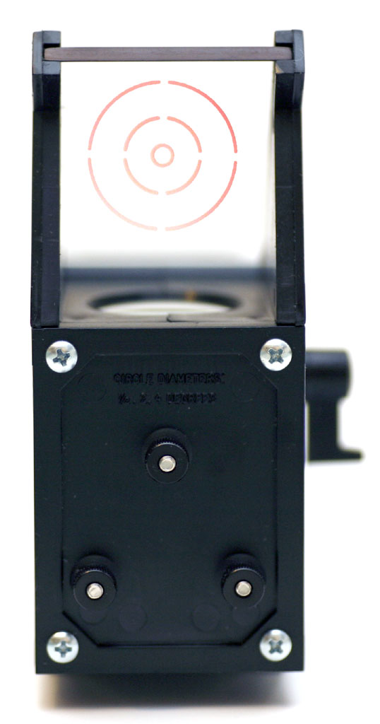 Der Telradsucher von hinten; Komposit aus zwei Bildern, um den eingeblendeten Suchkreis zu verdeutlichen. Kapege.de 15:19, 18 December 2006 (UTC)